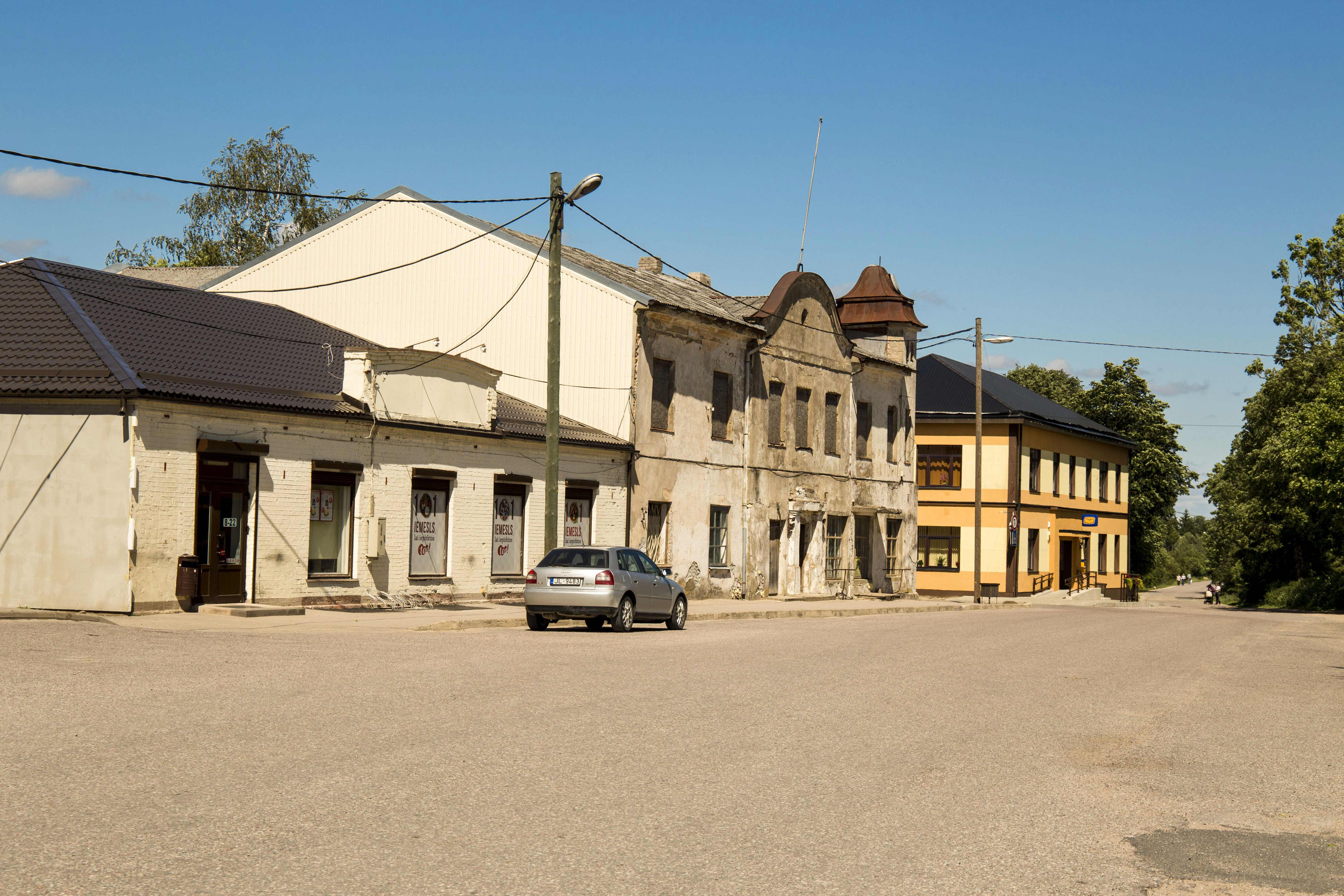 Vaiņode